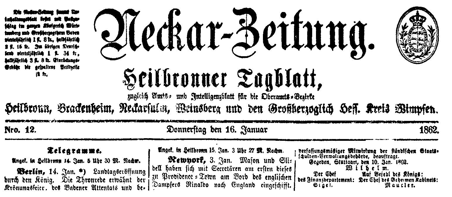 Titelkopf der Heilbronner Neckar-Zeitung